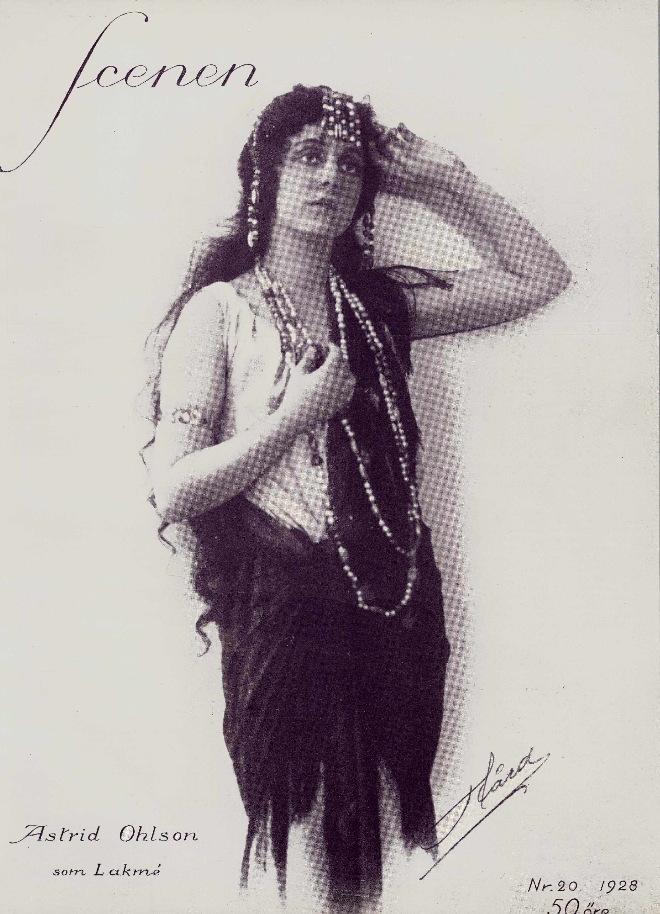 Hortensia Hedström (1890-1982) som Lakmé. Foto på omslag till Scenen 1928.